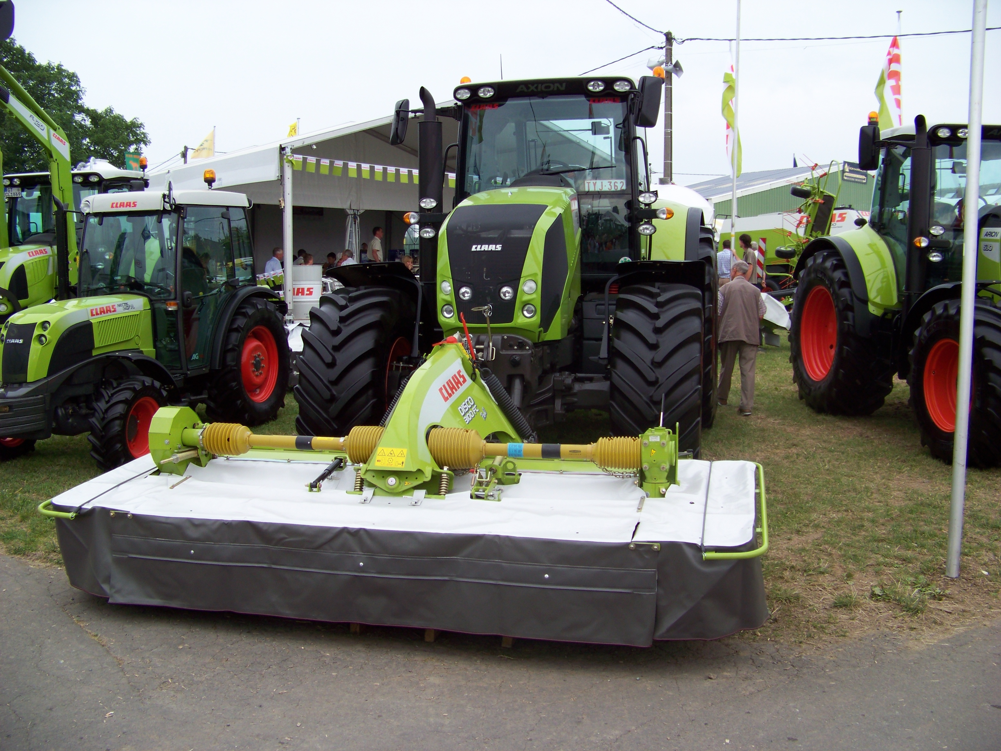 Ein Front-Scheibenmähwerk Disco 3100 FC Profil von Claas vor einem Claas-Traktor Axion, links ein Claas-Obsttraktor Nectis 257 VL; Foire agricole de Libramont 2008